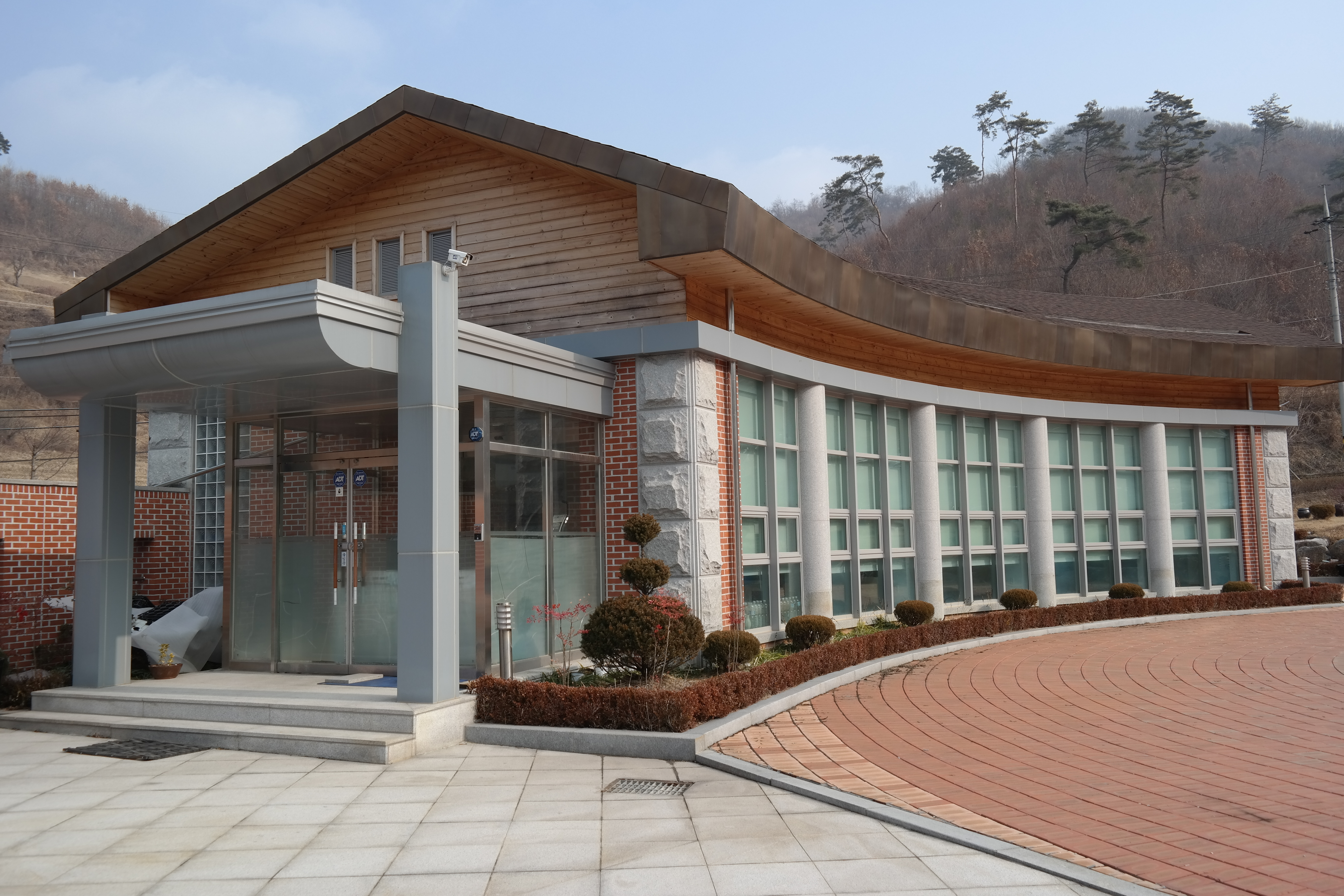 전북 임실군 운암면 사양리에 위치한 장진영 기념관.